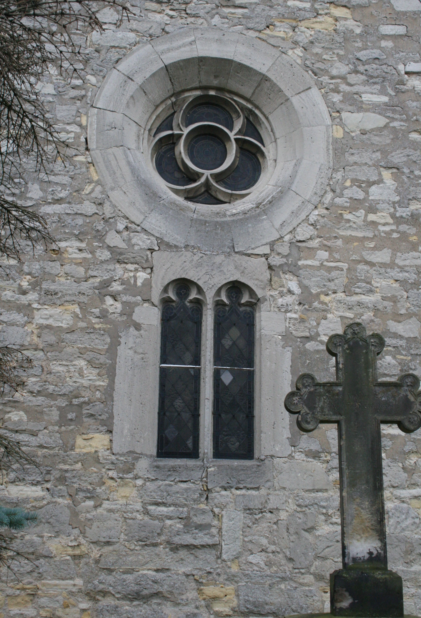 Abbildung der Ostseite der Hachumer Kirche mit Okuli und Maßwerk sowie Fenster der Neoromanik